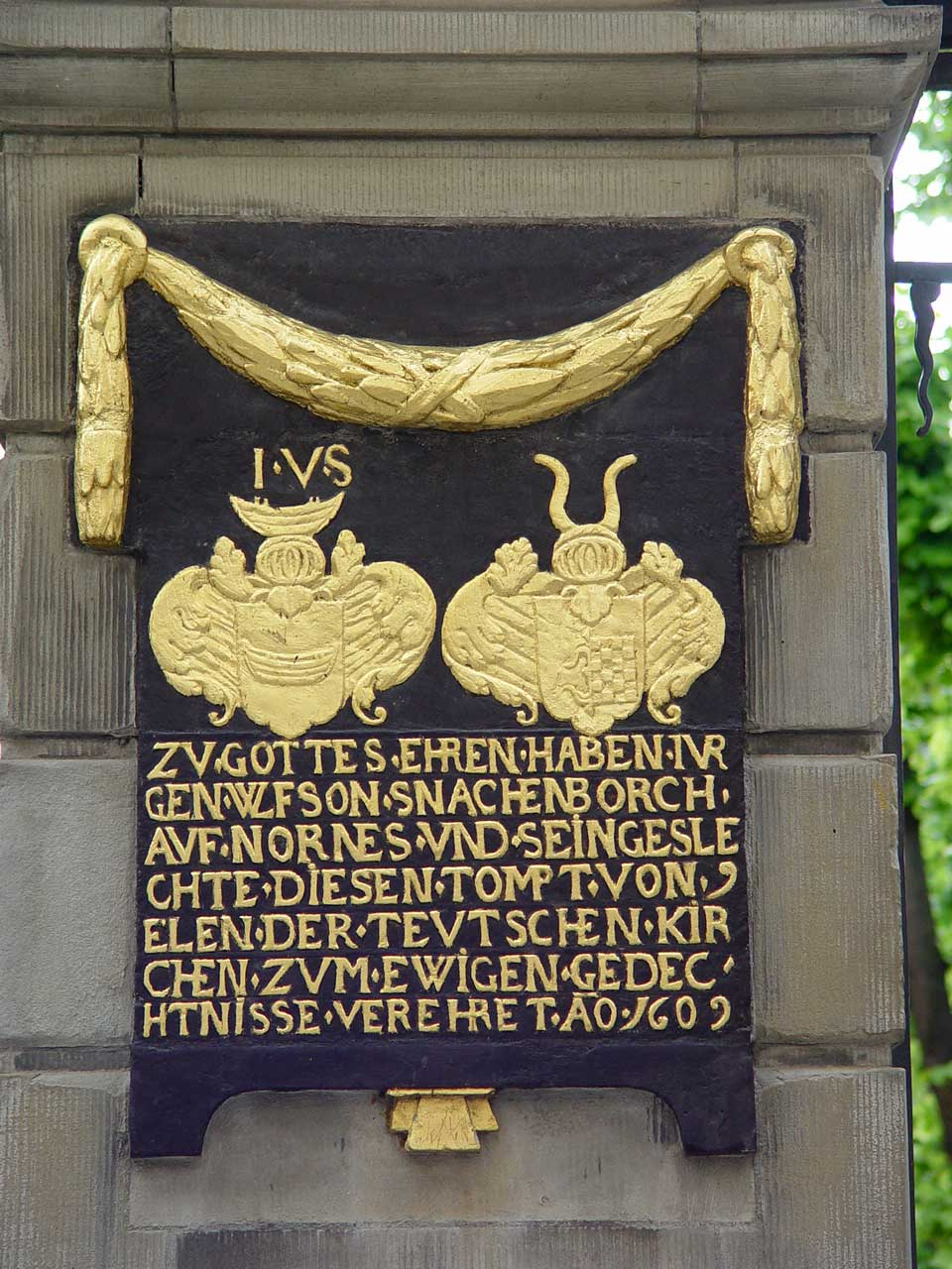 Tyska kyrka (Deutsche Kirche) in Stockholm, Gamla stan.